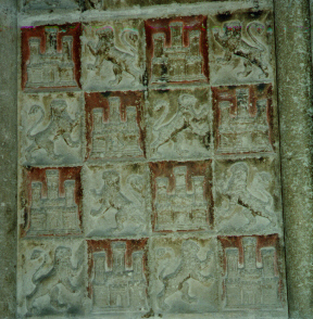 Wappen von Kastilien und León in der Kathedrale von Burgos, selbst fotografiert 1993